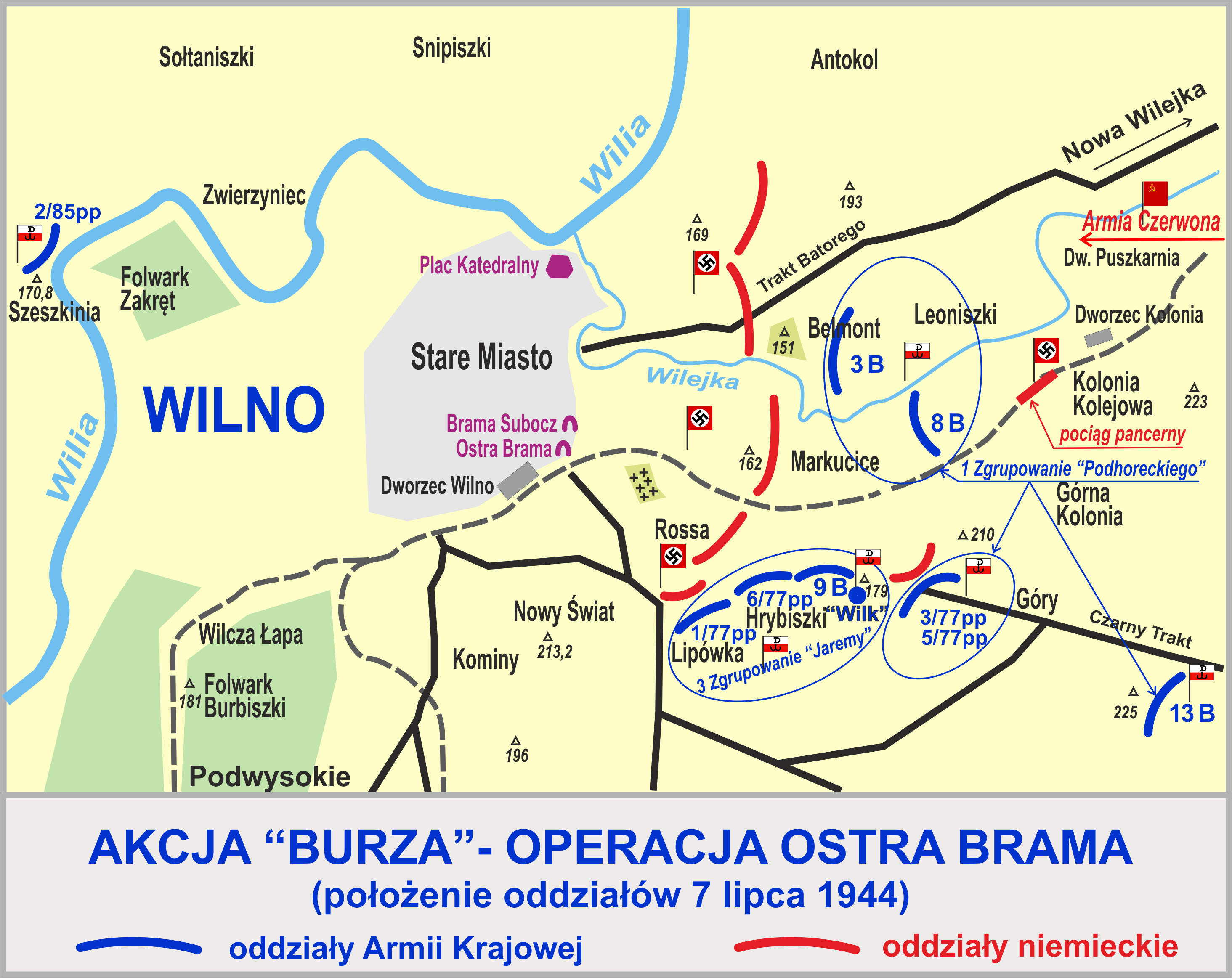 Akcja "Burza" - Operacja Ostra Brama (położenie oddziałów 7 lipca 1944)